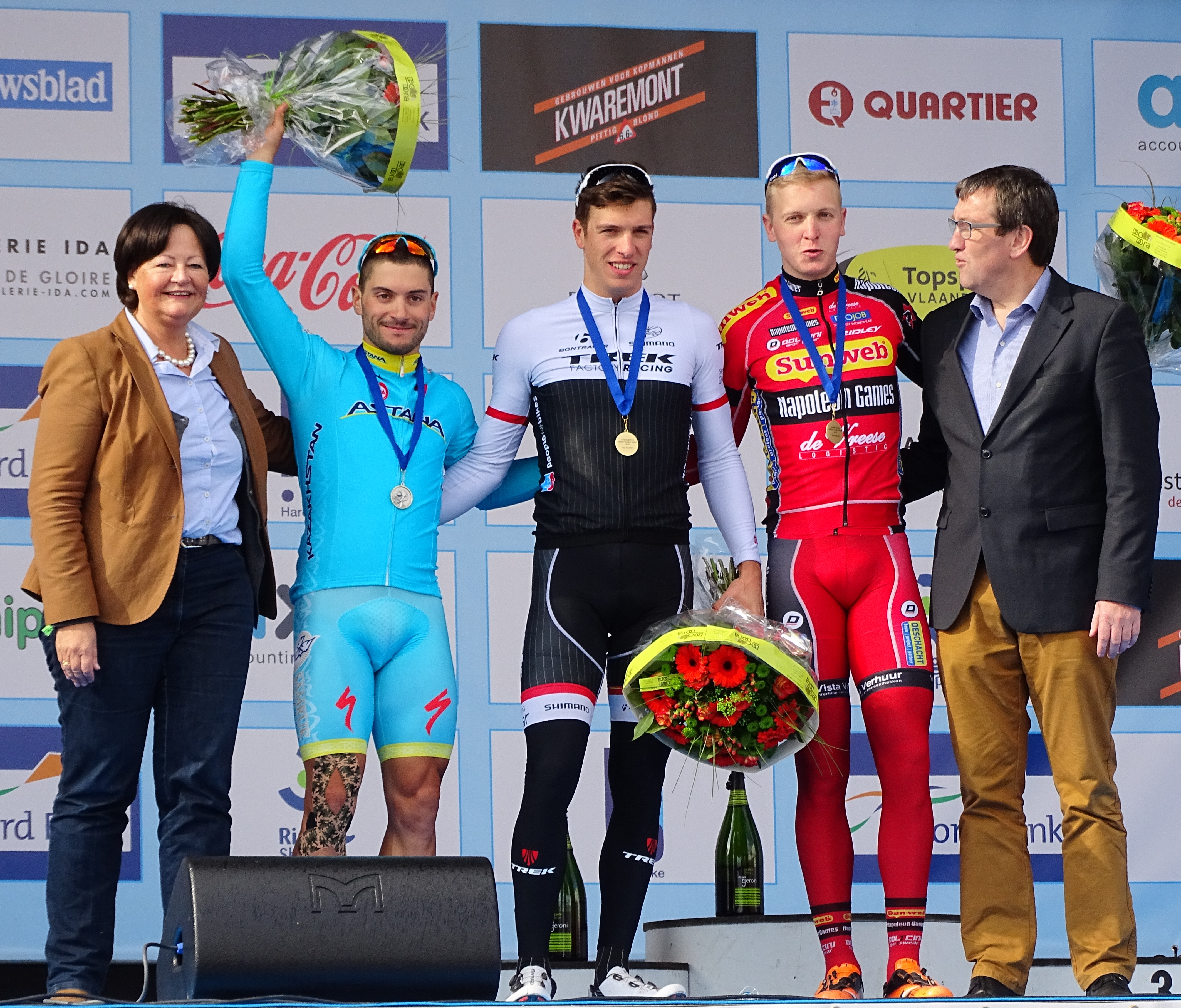 Reportage réalisé le vendredi 27 mars à l'occasion du départ et de l'arrivée du Grand Prix E3 2015 à Harelbeke, Belgique.